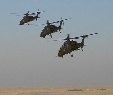 I tre elicotteri d'attacco Italiani Agusta A129 Mangusta inviati in Iraq. Foto proveniente dal sito Sito Ufficiale dell'Esercito Italiano, Autorizzazione.